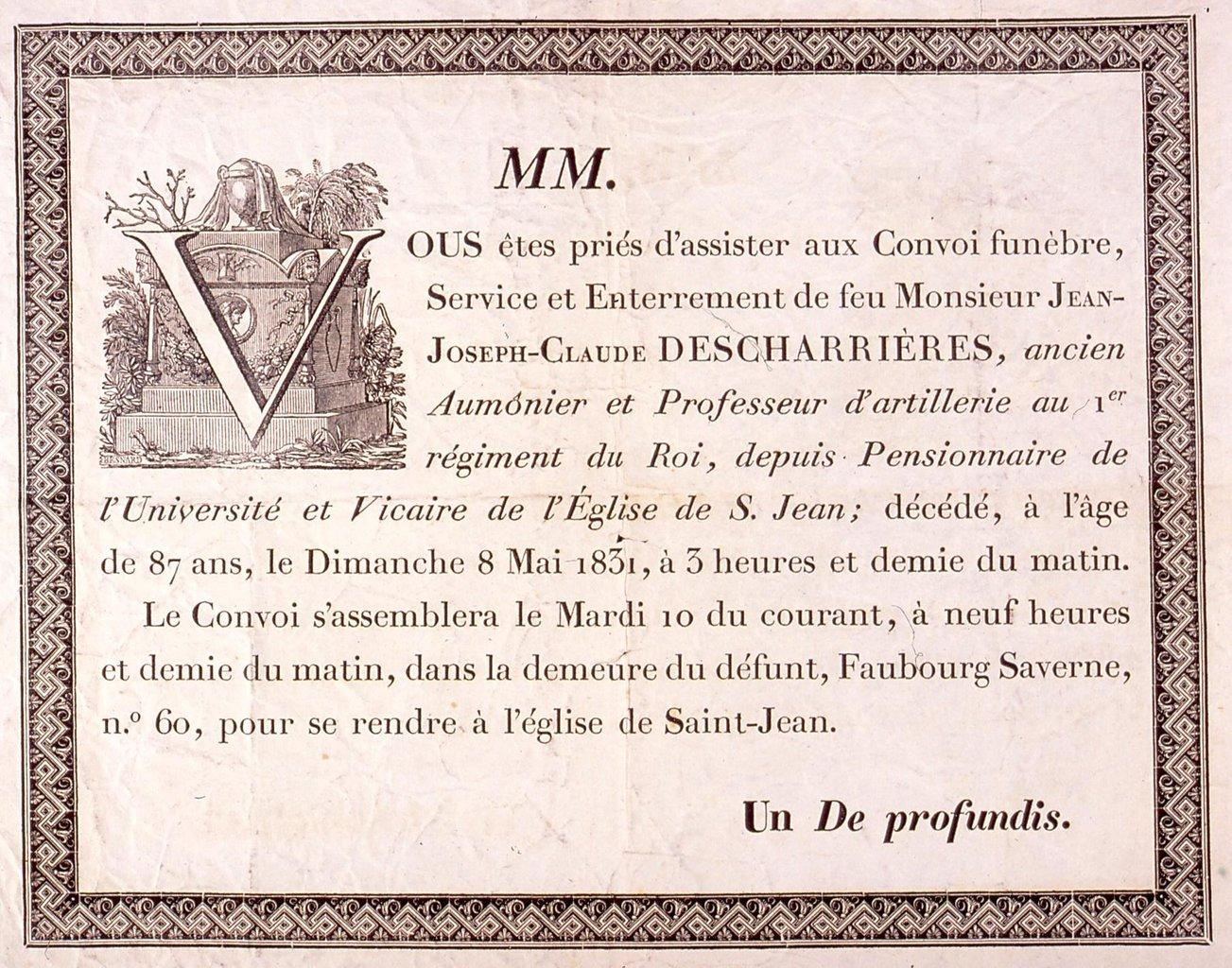 Annonce Mortuaire Jean-Joseph-Claude Descharièrres, Bibliothèque nationale et universitaire de Strasbourg